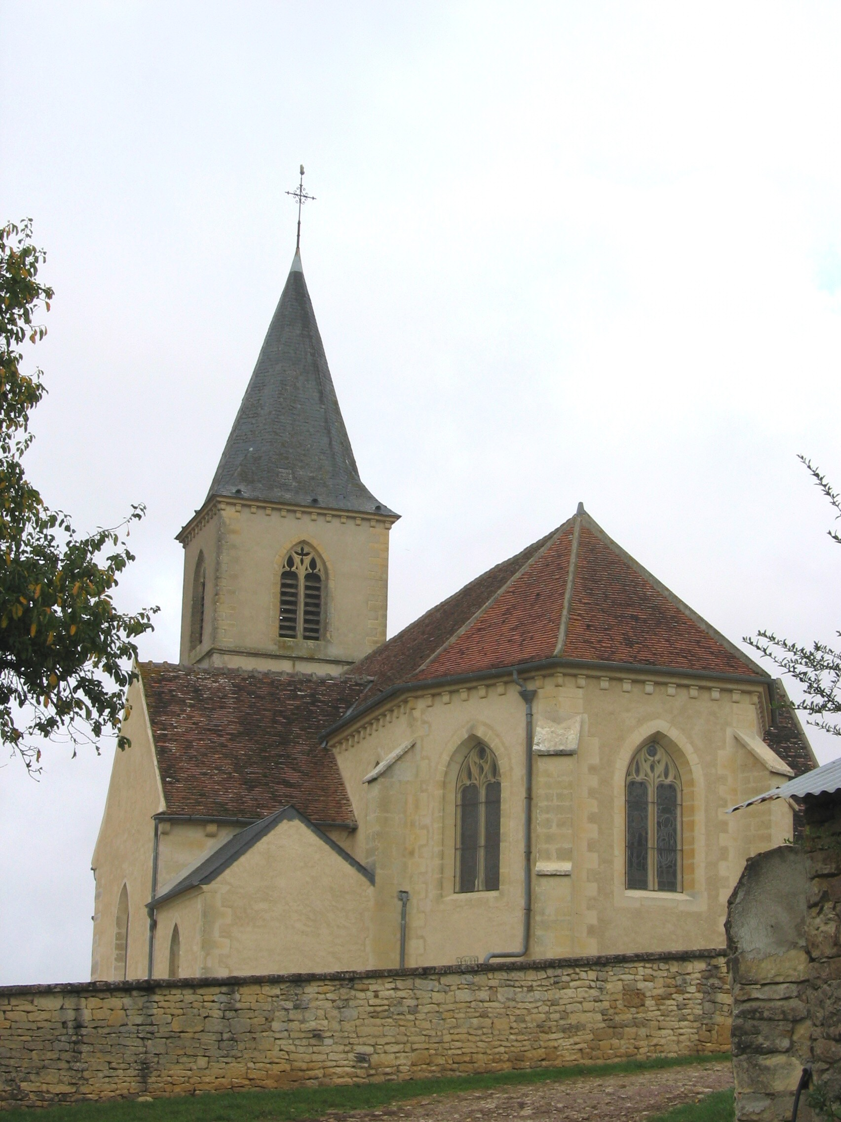 église de Vignol (Nièvre)